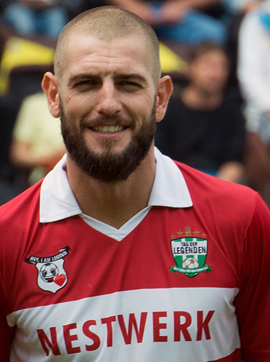 Mladen Petrić als Spieler vom Team Hamburg beim Tag der Legenden 2016